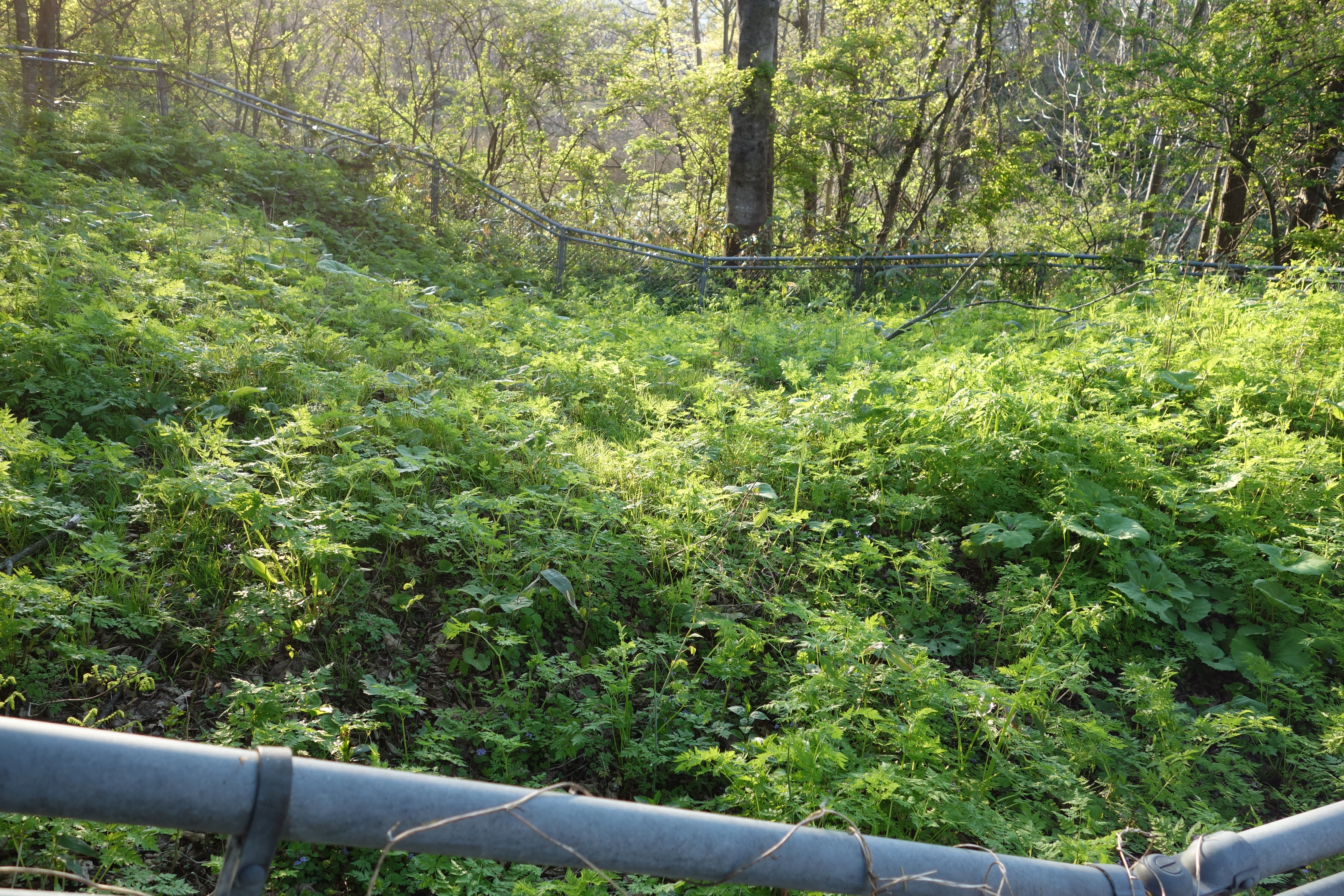 秋田県能代市古屋布にある柏子所貝塚